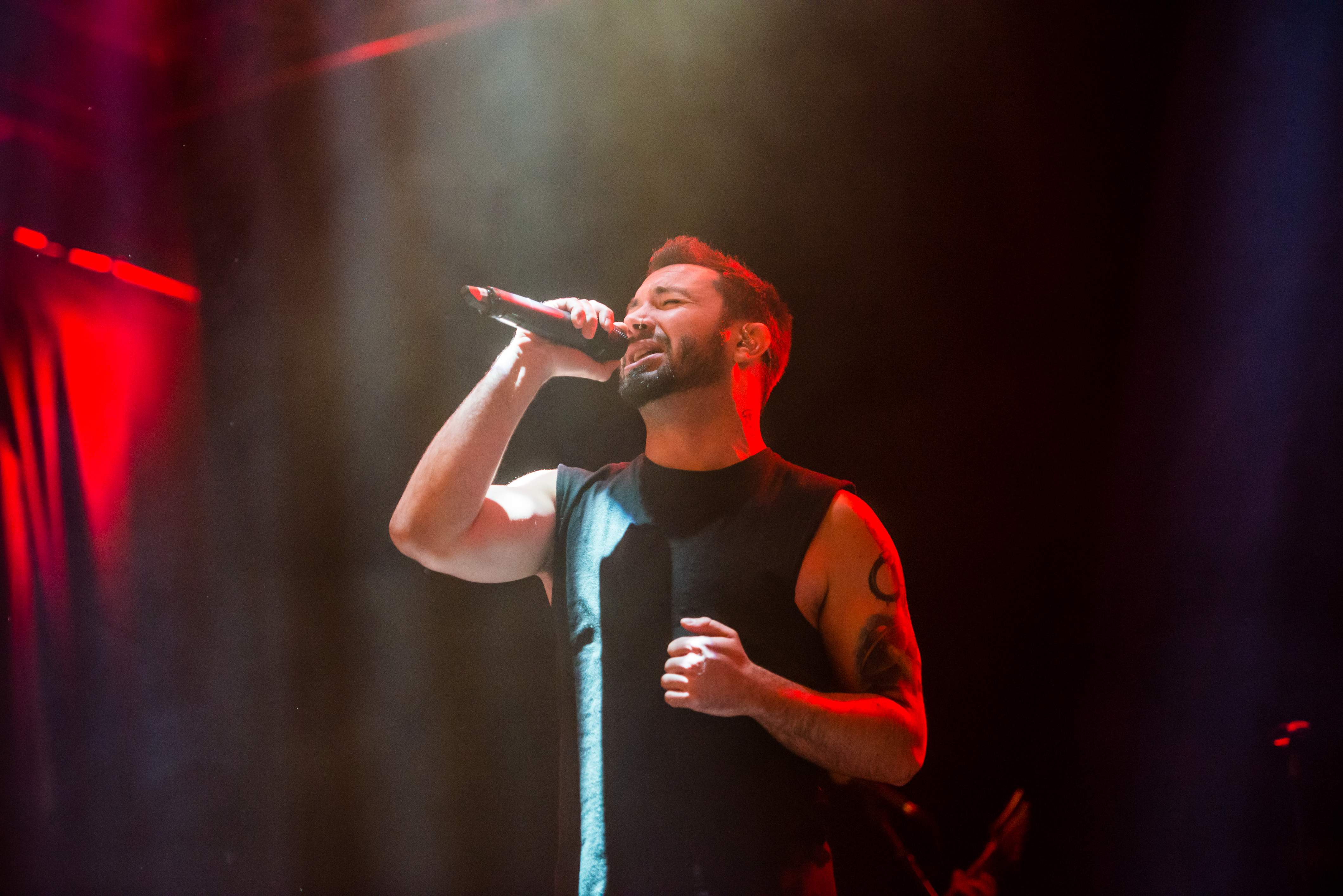 'Periphery - Epic Metal Fest - Eindhoven'